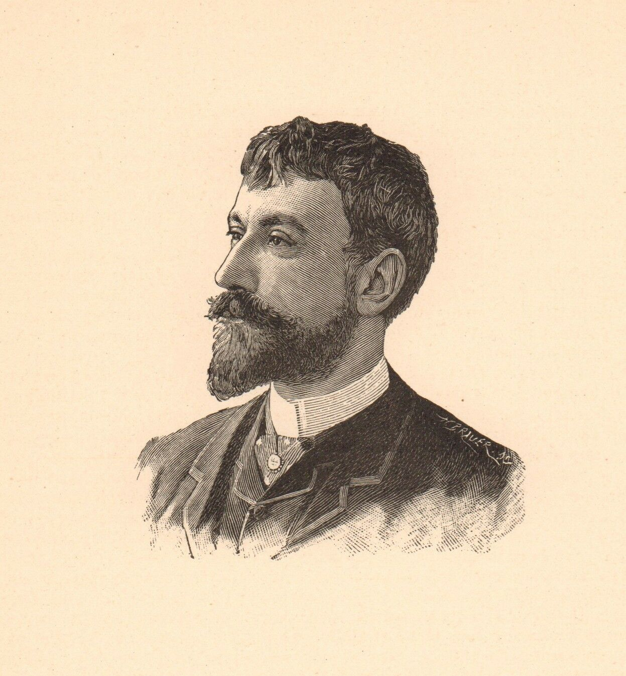 French painter and illustrator Louis-Maurice Boutet de Monvel (1851-1913)